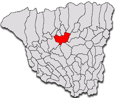 Categorie:Hărţi ale judeţului Gorj